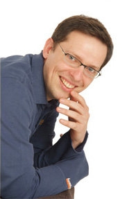 Olivier Arnould - Animateur Radio / Voix Off